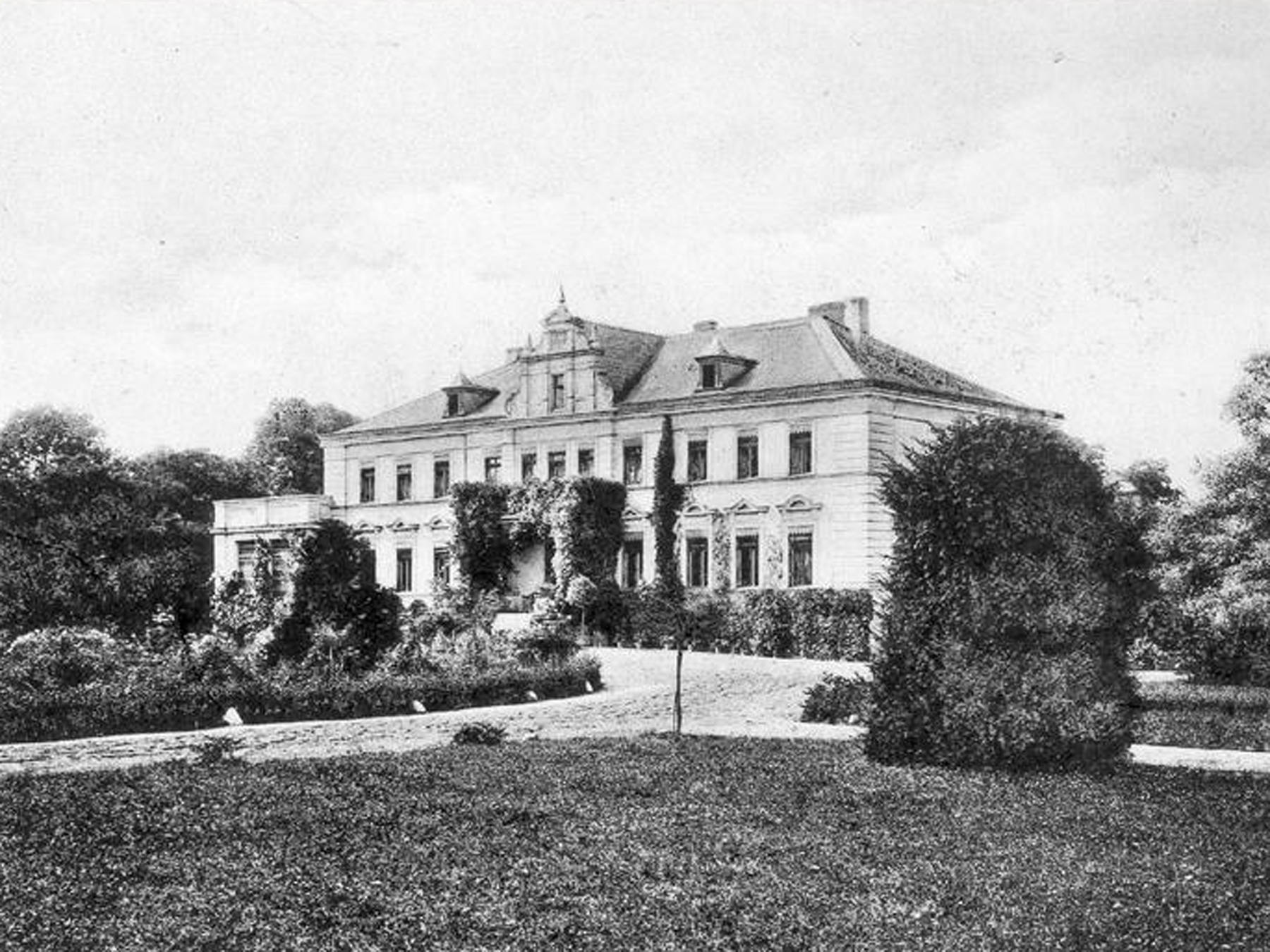 Pałac w Niegolewie dawniej